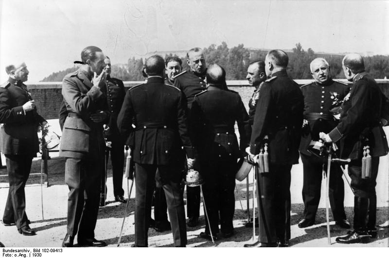 Der Ex-Diktator Spaniens, Primo de Rivera gestorben ! Aufnahmen aus der Glanzzeit seiner Diktatur. Der spanische Ex-Diktator Primo de Rivera im Gespräch mit Offizieren der Armee.